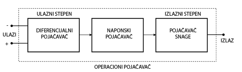 Blok šema operacionog pojačavača. Ja sam autor ove slike i predajem je u javno vlasništvo. Licensing